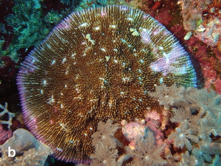 Halomitra pileus, en Pulau Layang-Layang, islas Spratly, 2013.